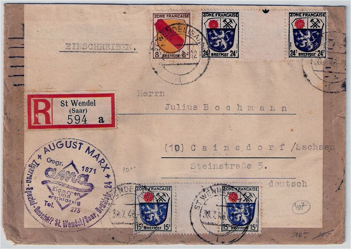 Brief an den Philatelisten und Herausgeber des Bochmann-Kataloges der deutschen Gelegenheitsstempel, Julius Bochmann, von 1946 mit Briefmarken der Französischen Besatzungszone